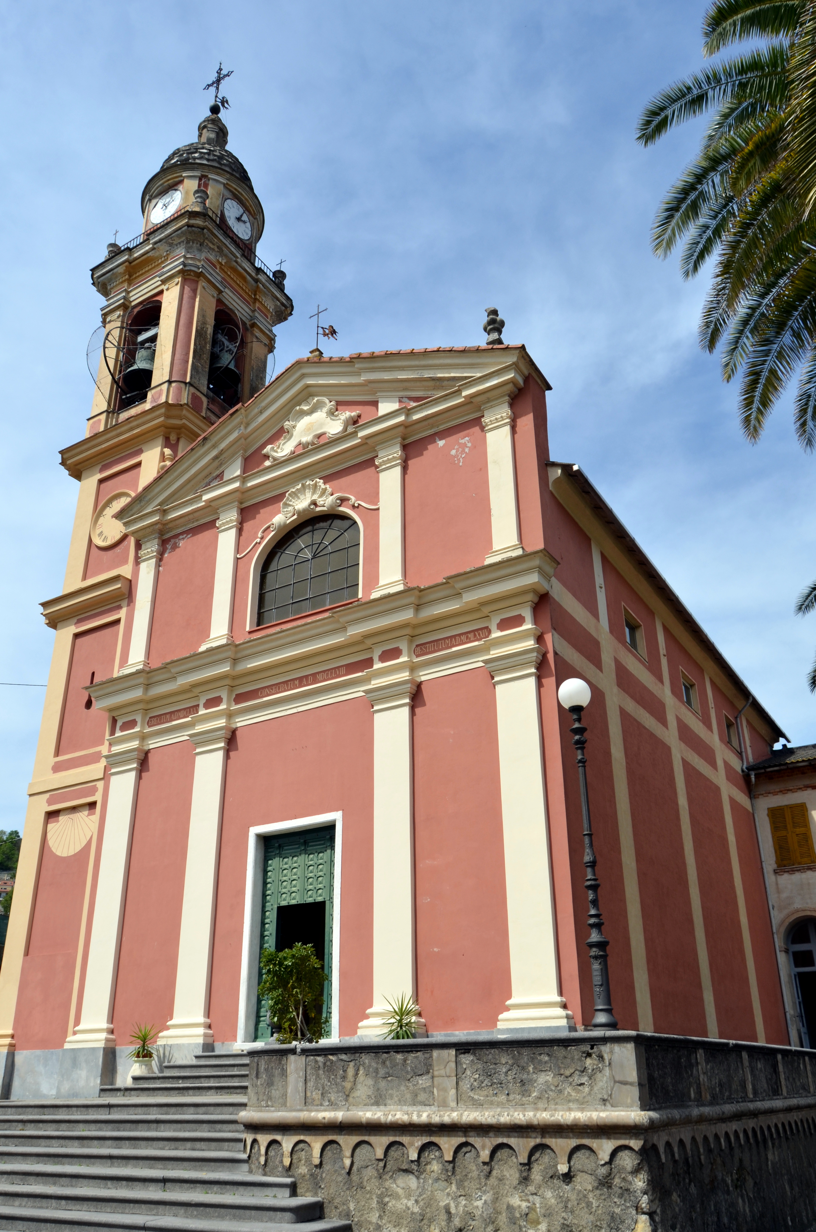 Chiesa di San Michele Arcangelo, Casarza Ligure, Liguria, Italia